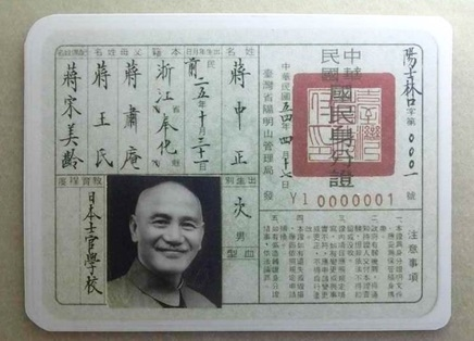 中文（台灣）: 中華民國54年4月17日，臺灣省陽明山管理局發給中華民國總統蔣中正的中華民國國民身分證正面，右上角蓋臺灣省政府印。摘自國立中正紀念堂管理處facebook頁面【中正Q&A】。